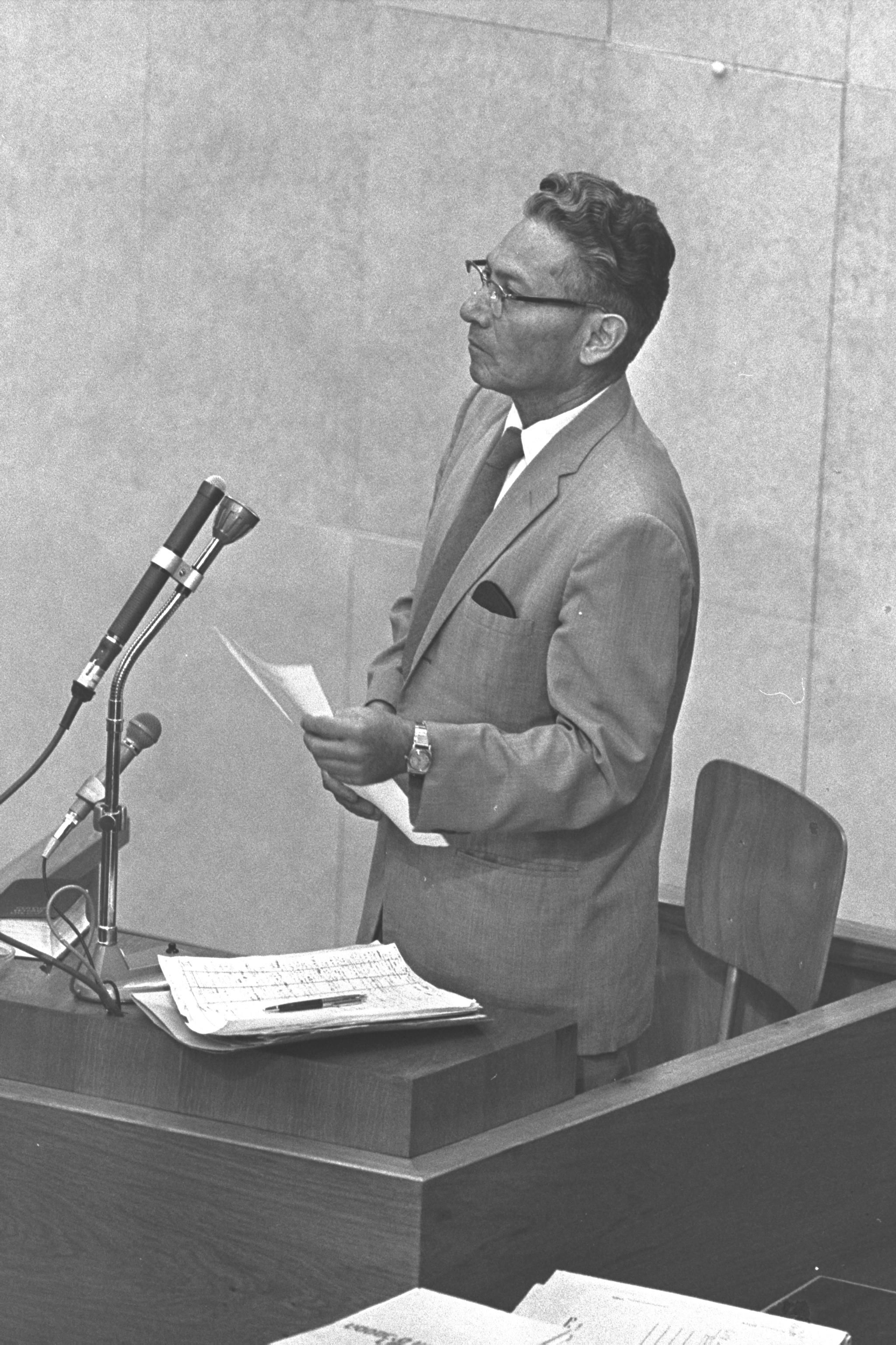 אהרן חטר-ישי מעיד במשפט אייכמן בירושלים, 1961